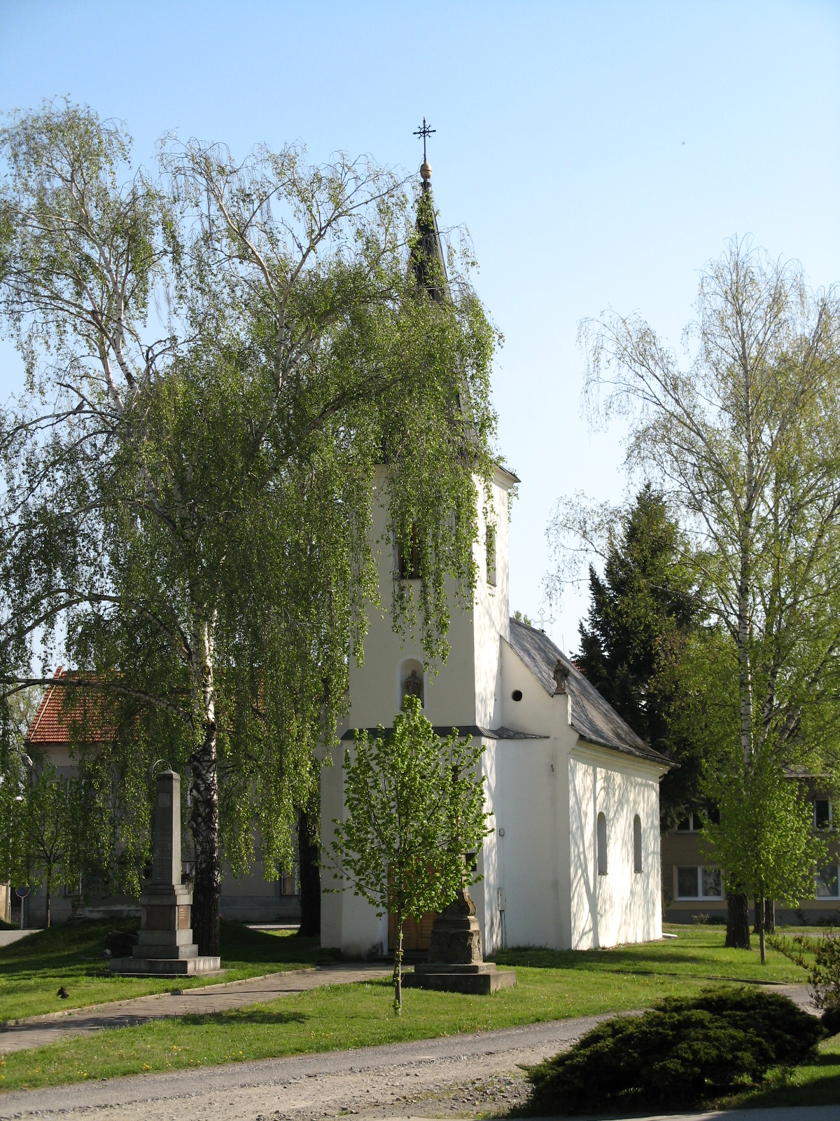 Kaple sv. Floriána (Vrbátky), náves, Vrbátky